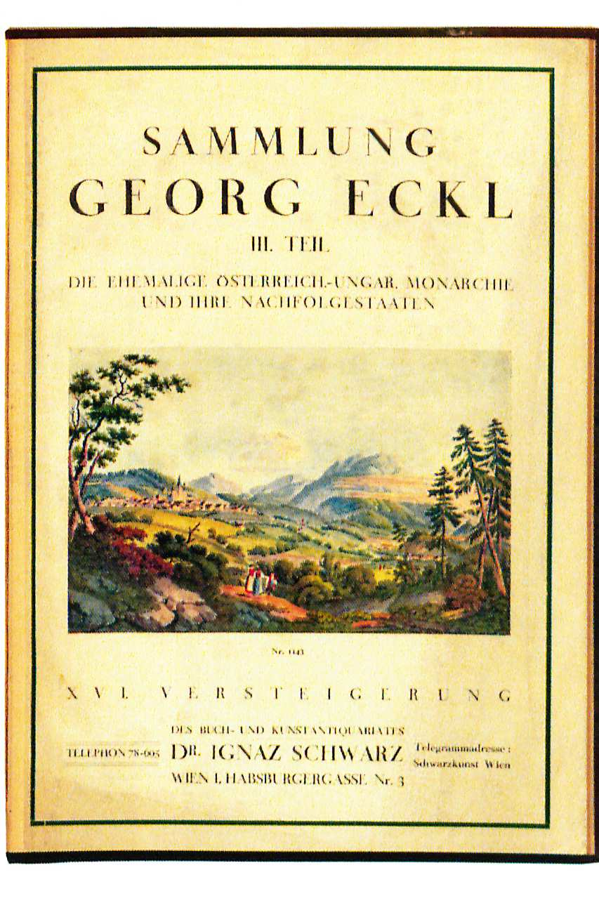 Ignaz Schwarz (Antiquar) Sammlung Georg Eckl Versteigerung 1926-27. Das Umschlagbild ist (noch) nicht zugeordnet.